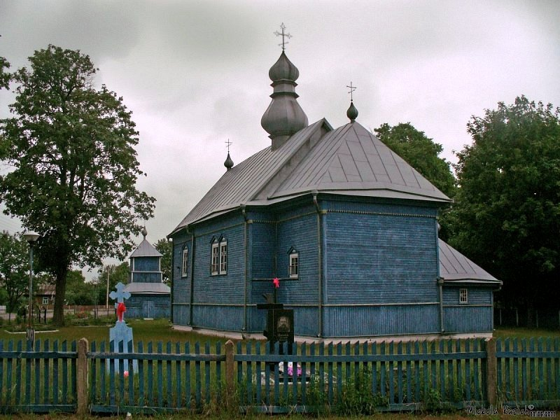 Ляхаўцы. Царква